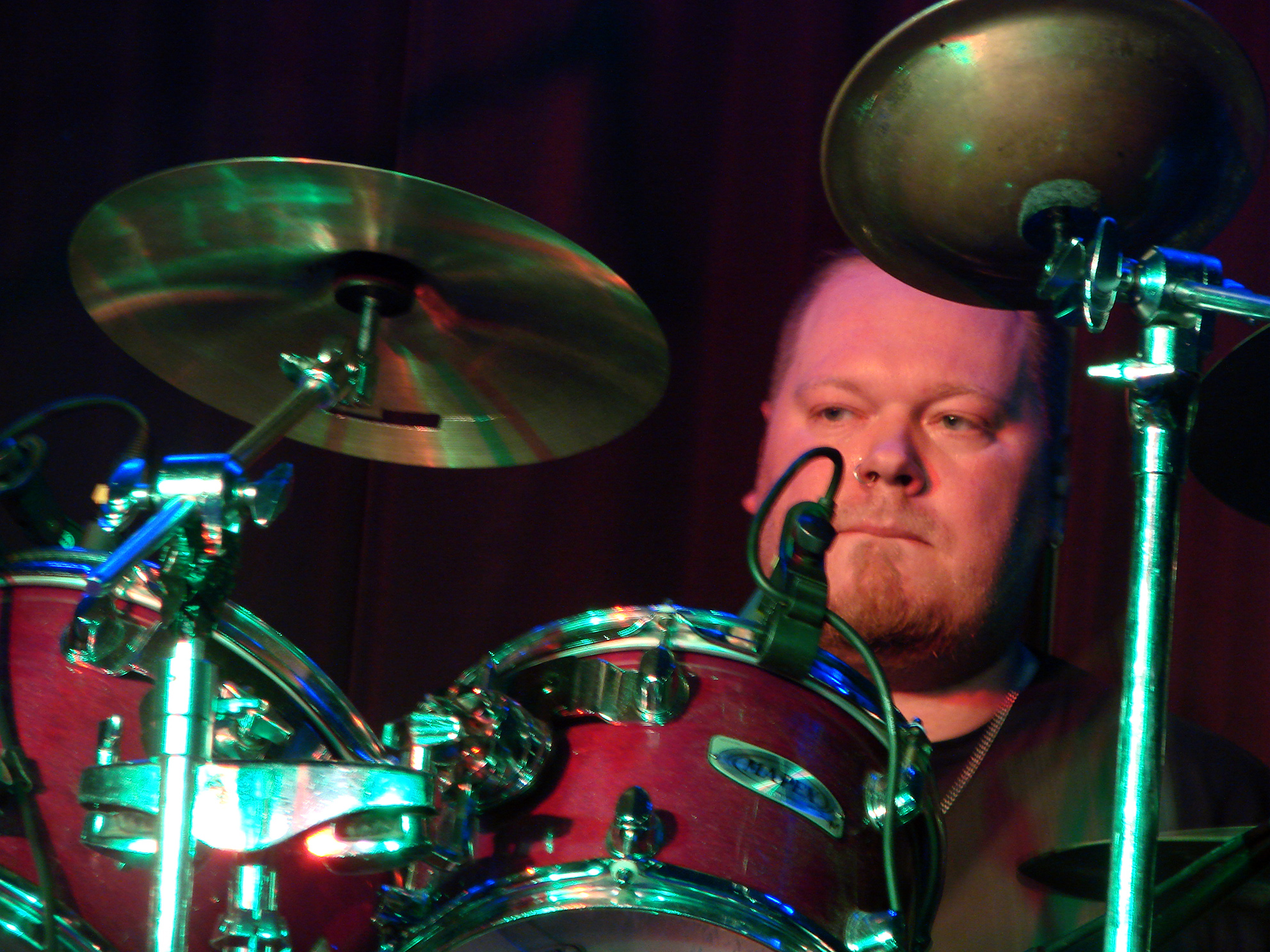 Melechesh au Chaulnes Fest, le 22/03/08: Xul.